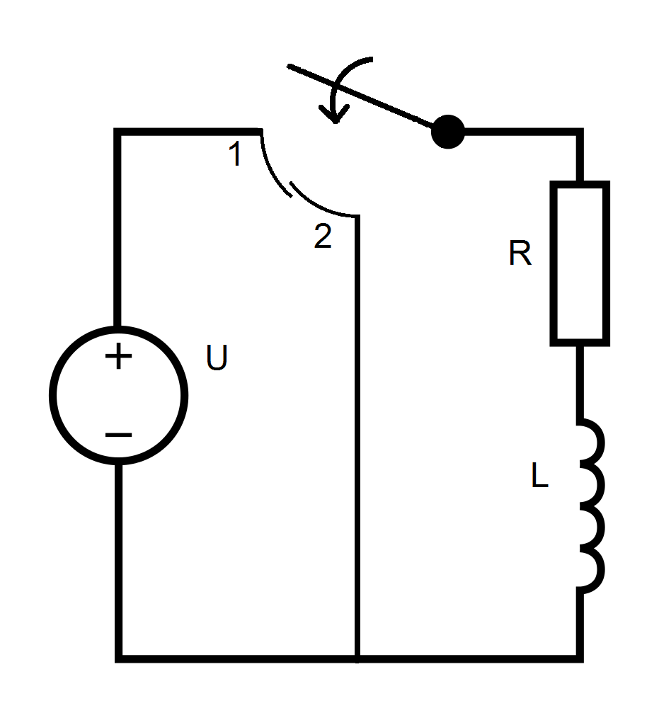 Based on the drawing named "RL Series Open-Closed.svg" made by inductiveload.